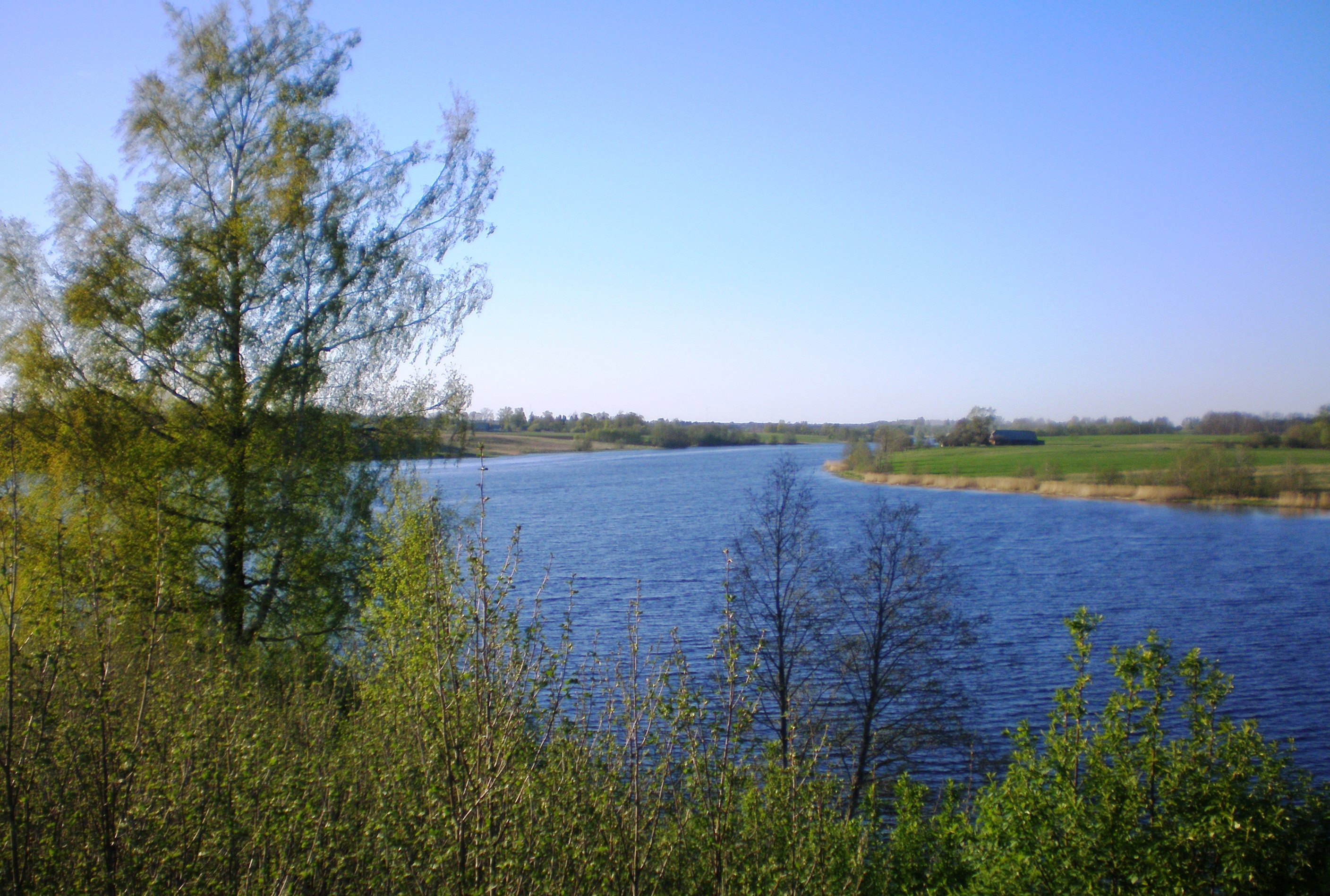 Vaitiekūnų tvenkinys, Radviliškio raj.